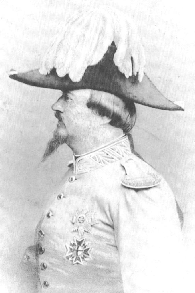 Adalberto de Baaviera